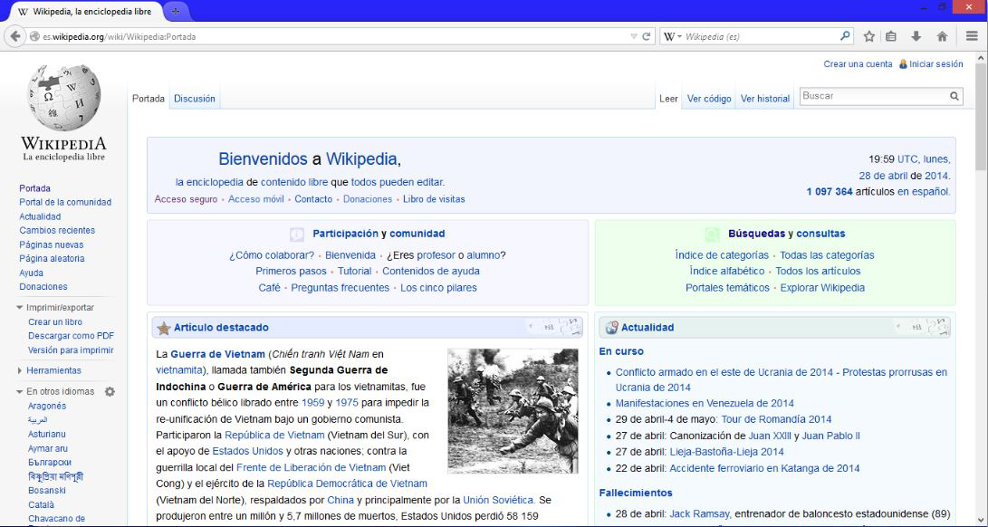 Firefox 28 en Windows 8.1.